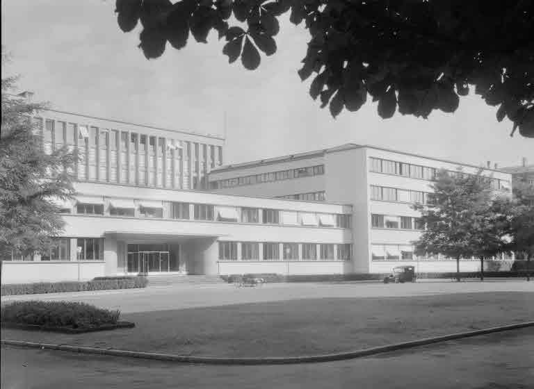 Aussenaufnahme Landesbibliothek, Bern